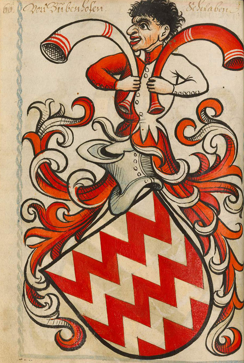 Scheibler'sches Wappenbuch, älterer Teil, Seite66 Bubenhofen